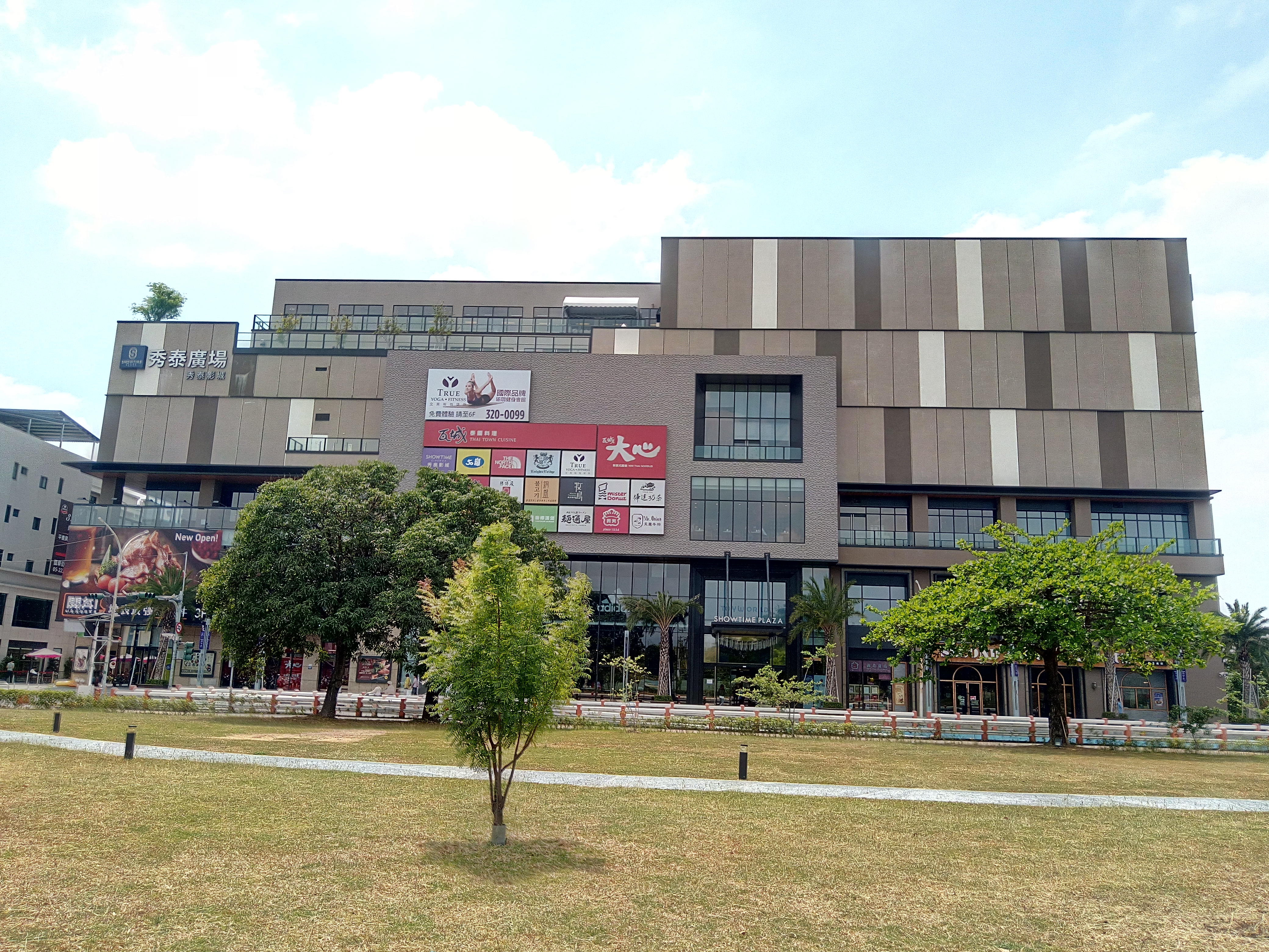 嘉義秀泰プラザ